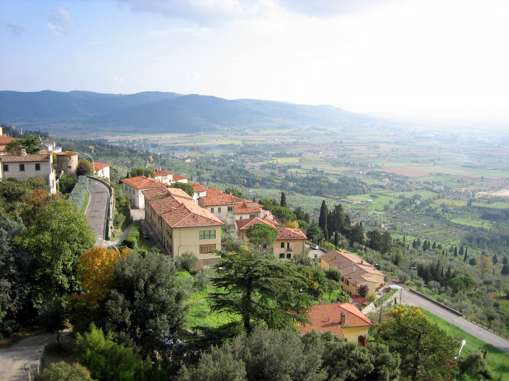 View, Cortona, Toscana, Italy